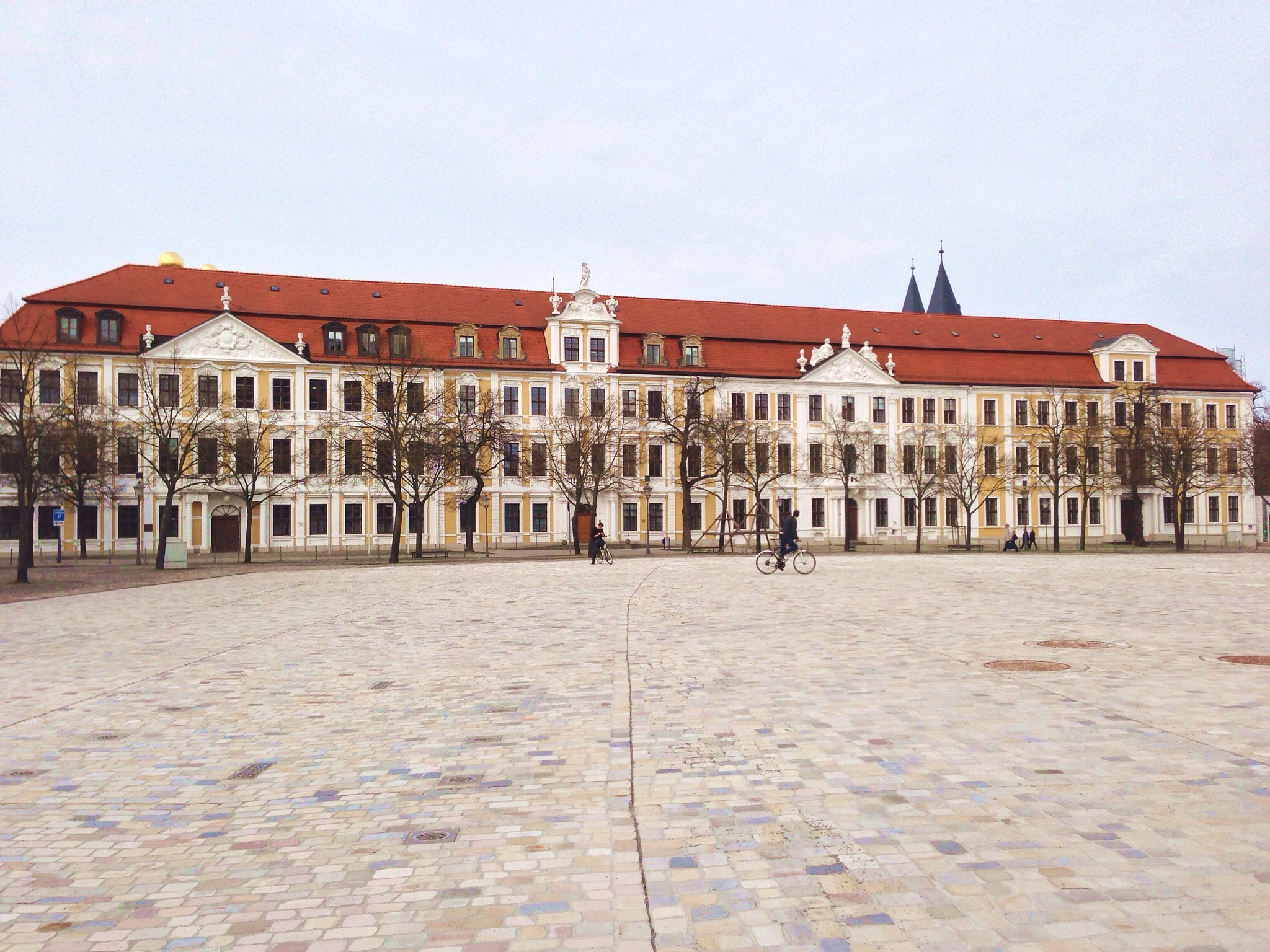 Das Landtagsgebäude Sachsen-Anhalt in Magdeburg am Domplatz 6-9